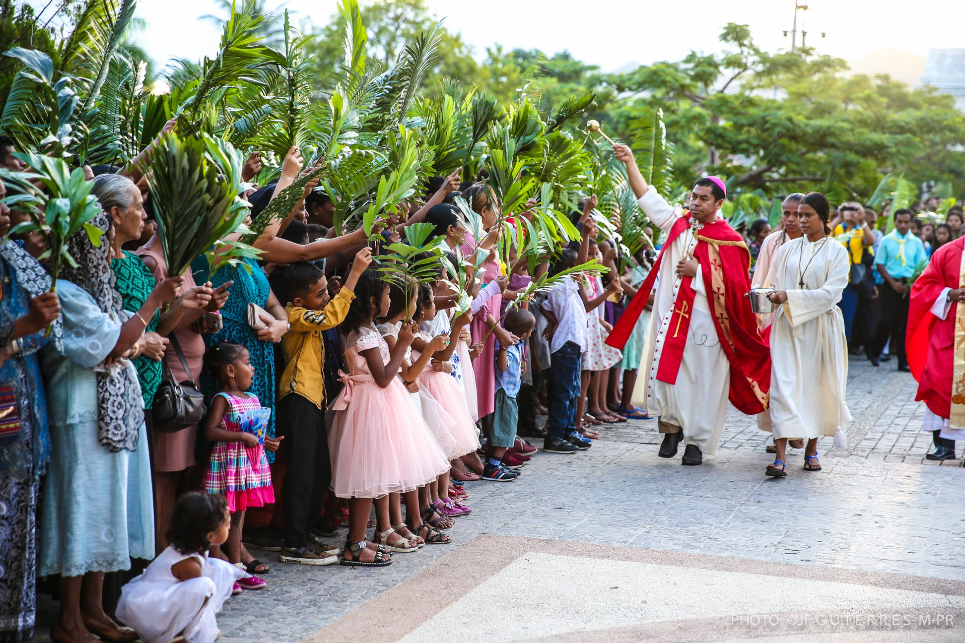 Dilis Bischof Virgílio do Carmo da Silva segnet am Palmsonntag die Gläubigen